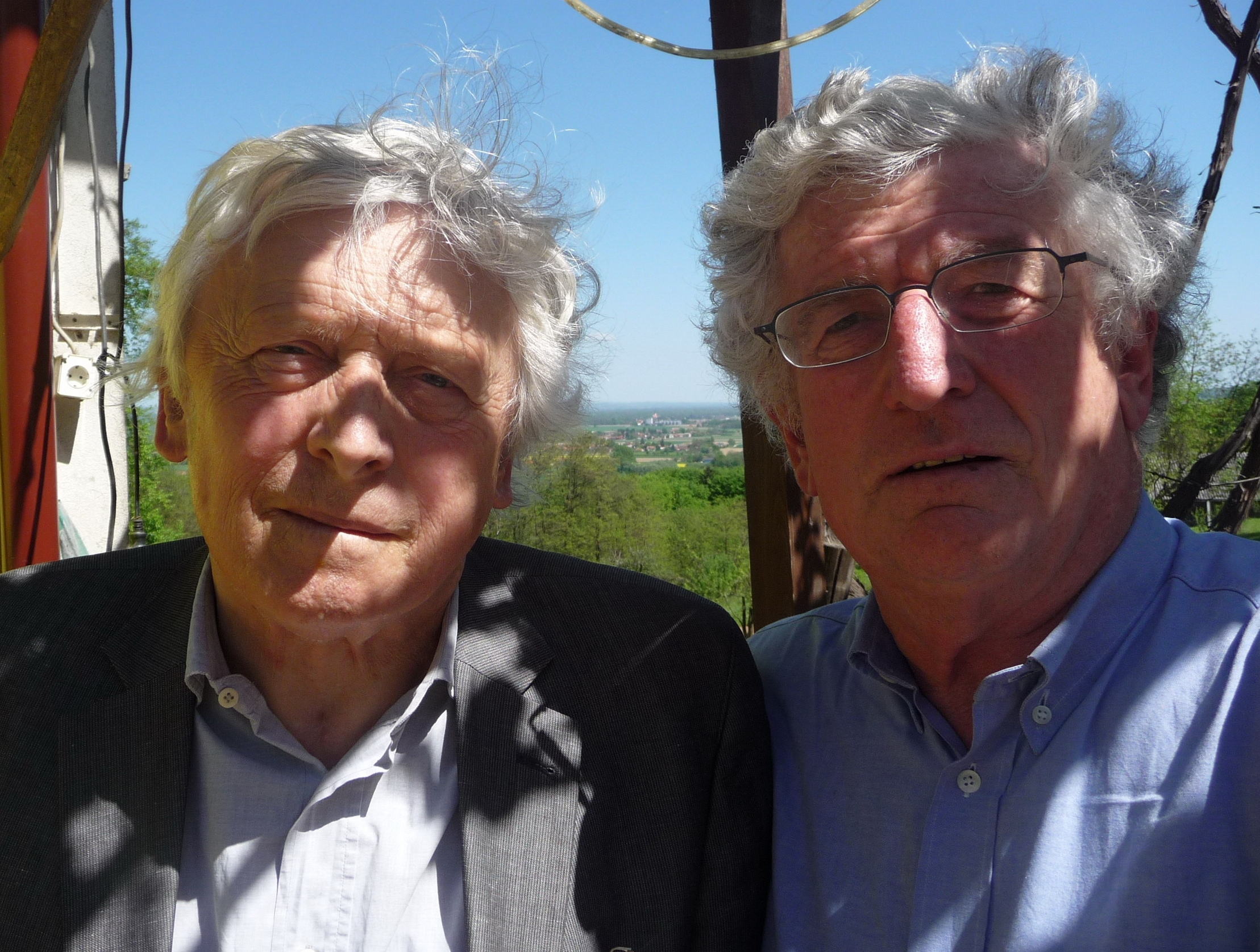 Alfred Kolleritsch und Josef Wilhelm (rechts); die schriftliche Genehmigung der beiden portraitierten Personen zur Veröffentlichung des Bildes liegt dem Autor vor. Personality rights warningAlthough this work is freely licensed or in the public domain, the person(s) shown may have rights that legally restrict certain re-uses unless those depicted consent to such uses. In these cases, a model release or other evidence of consent could protect you from infringement claims.